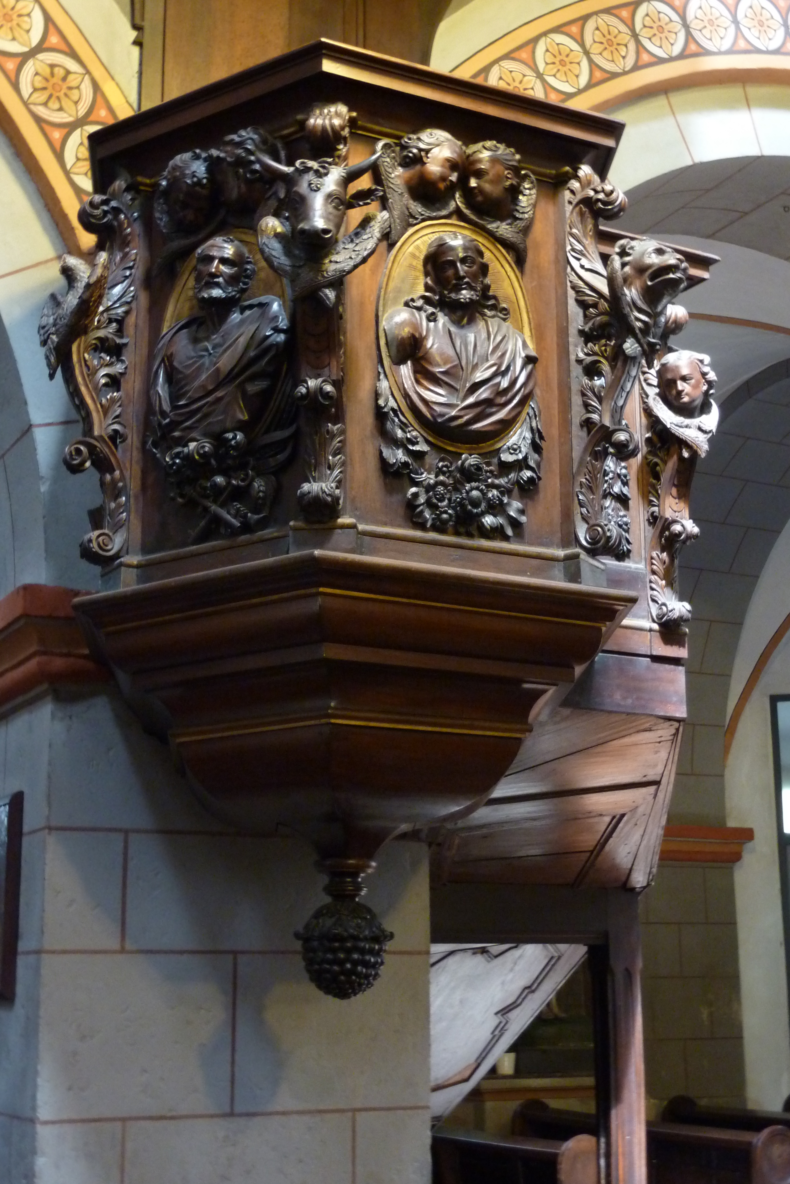 Kanzel in der Liebfrauenkirche in Andernach